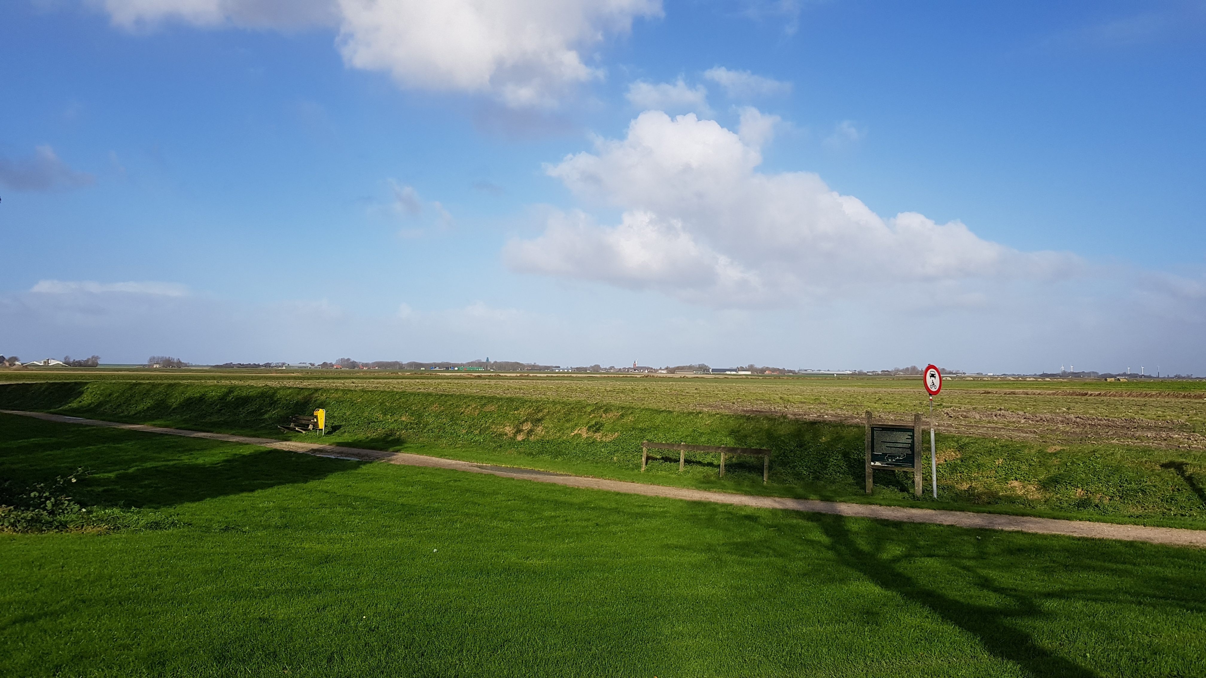 Terpenreeks Wijnaldum, Harlingen, Nederland